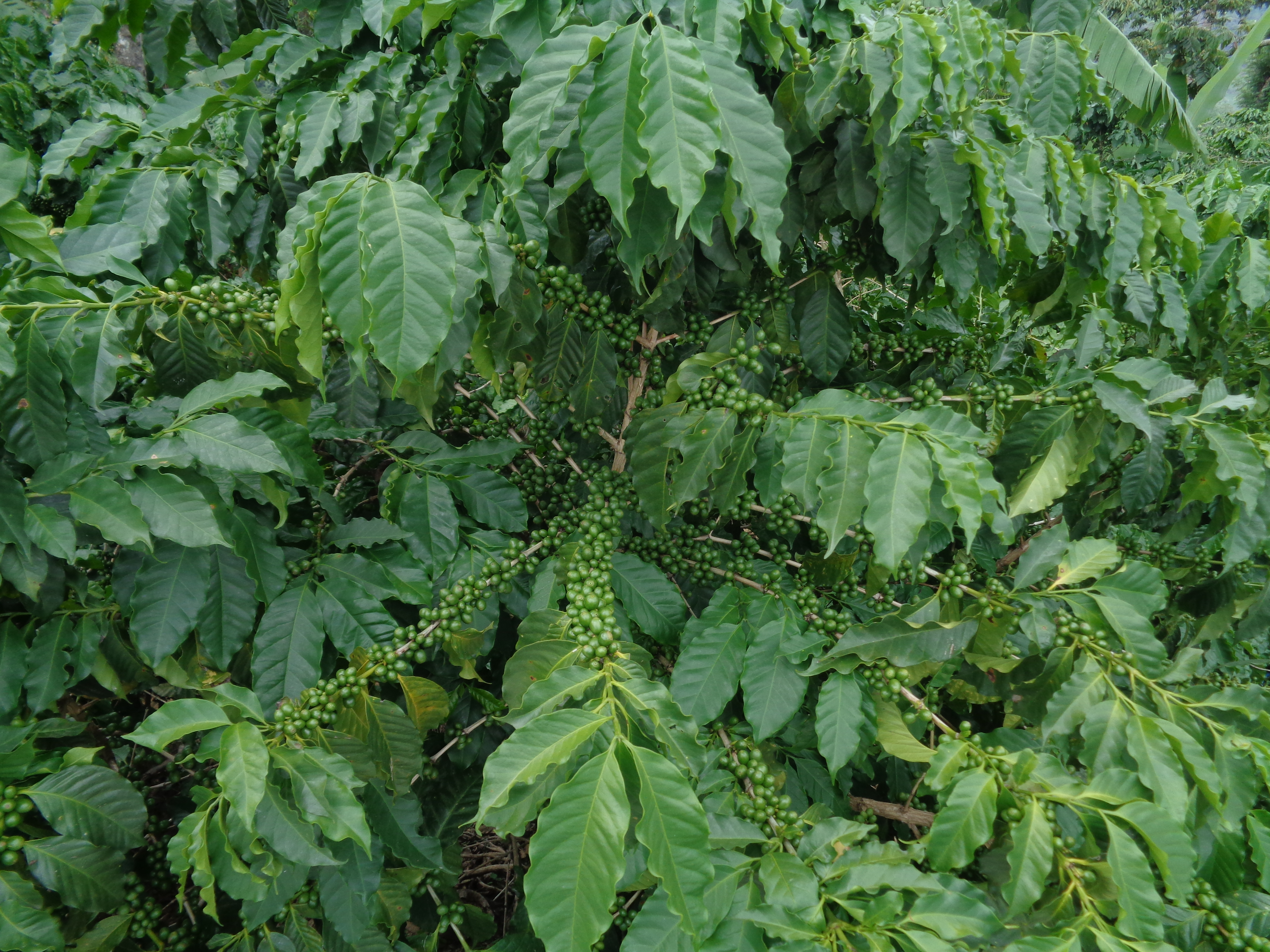 CULTIVO DE CAFÉ, EN EL PATERNAL ALDEA LA MESILLA